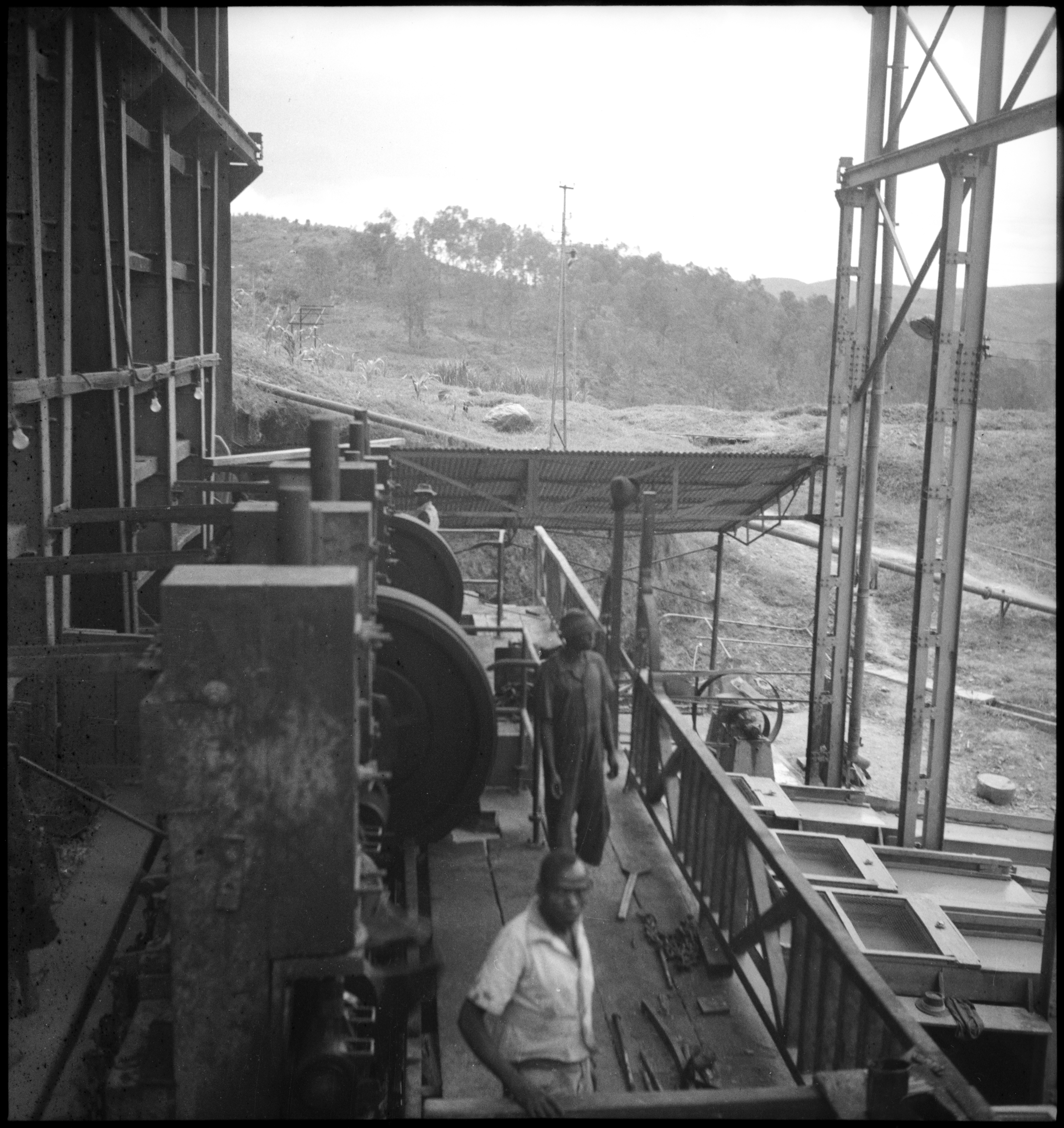 Belgisch-Kongo, Nizi: Alltagsszene; Zwei Minenarbeiter in den Tagesanlagen einer Mine in Kilo-Moto